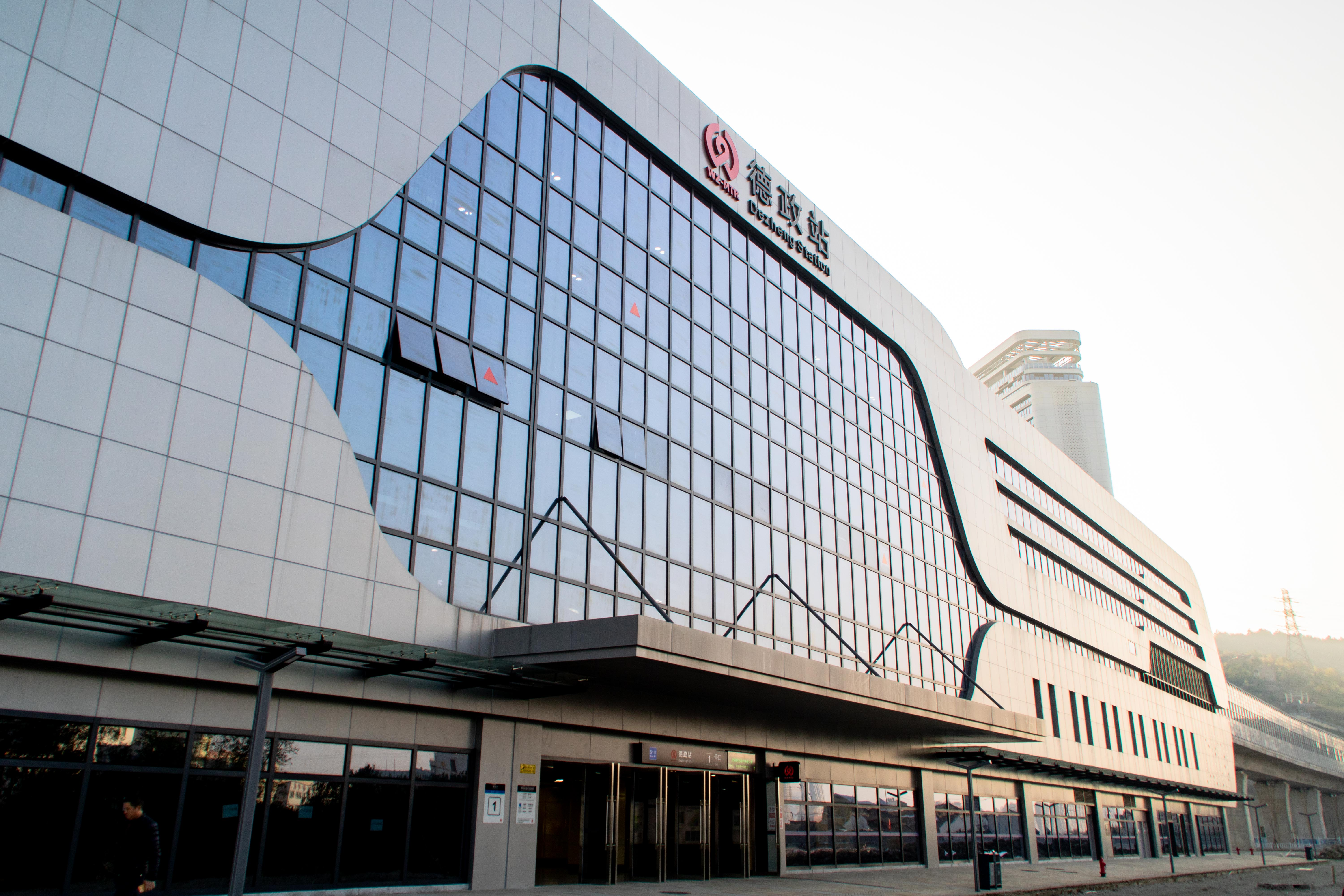 中文（中国大陆）: 德政站站房